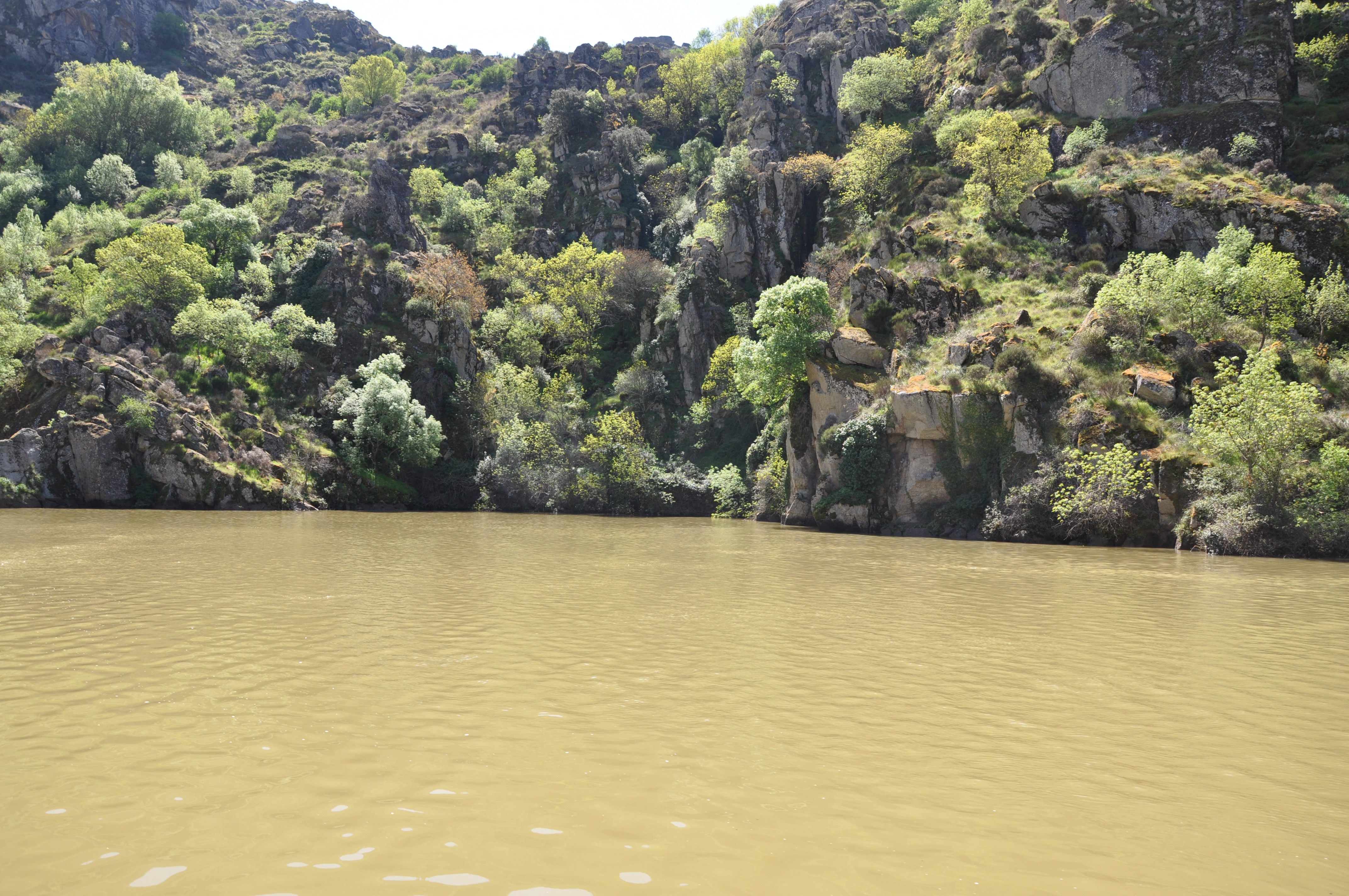 Vegetación en las arribas del Duero, margen española, Presa de Miranda do Douro, Portugal.